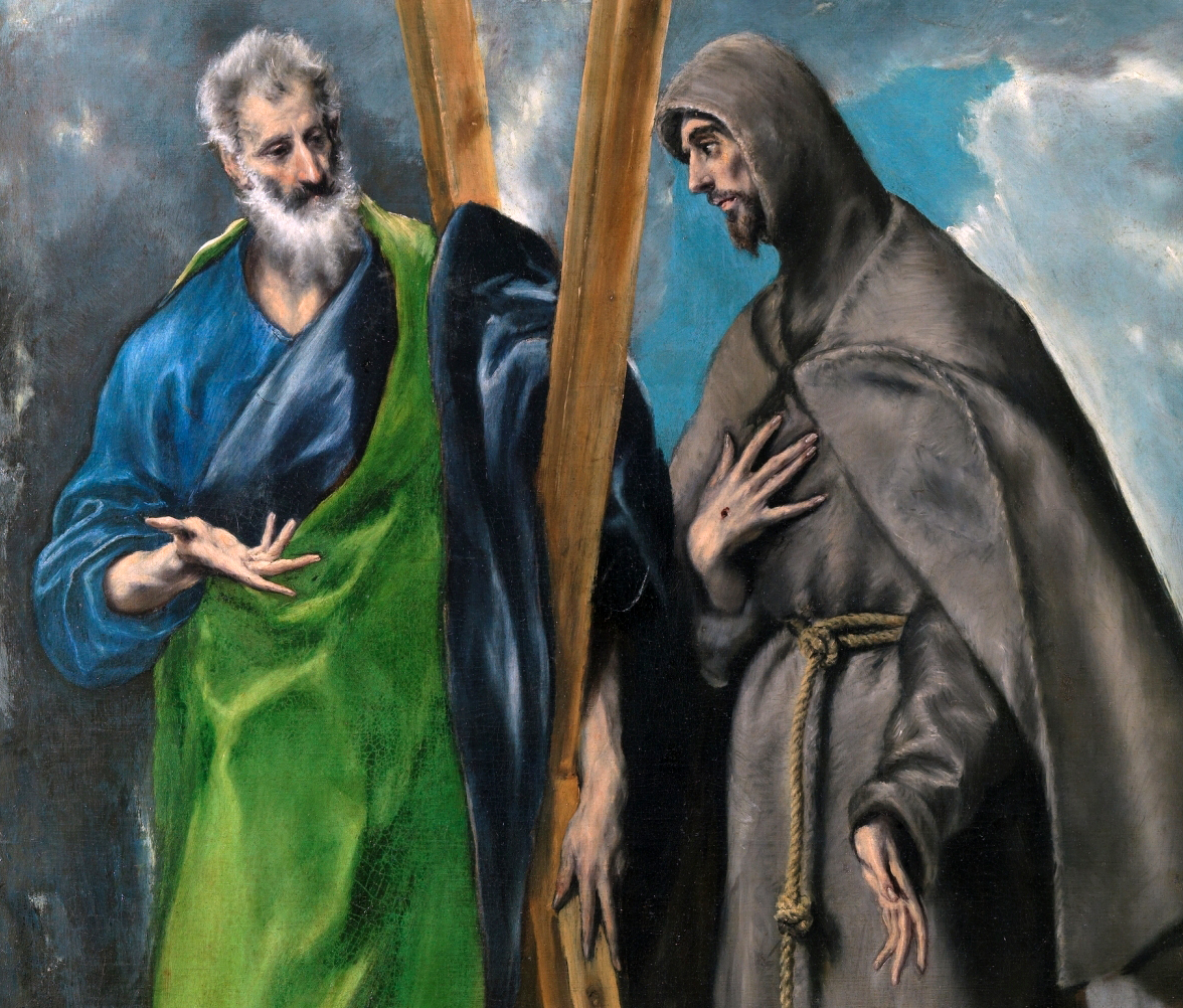 La obra representa al apóstol San Andrés, que era hermano del apóstol San Pedro, junto a San Francisco de Asís, fundador de la Orden de los franciscanos.